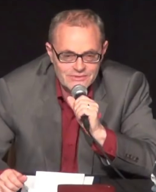 Lev Kreft